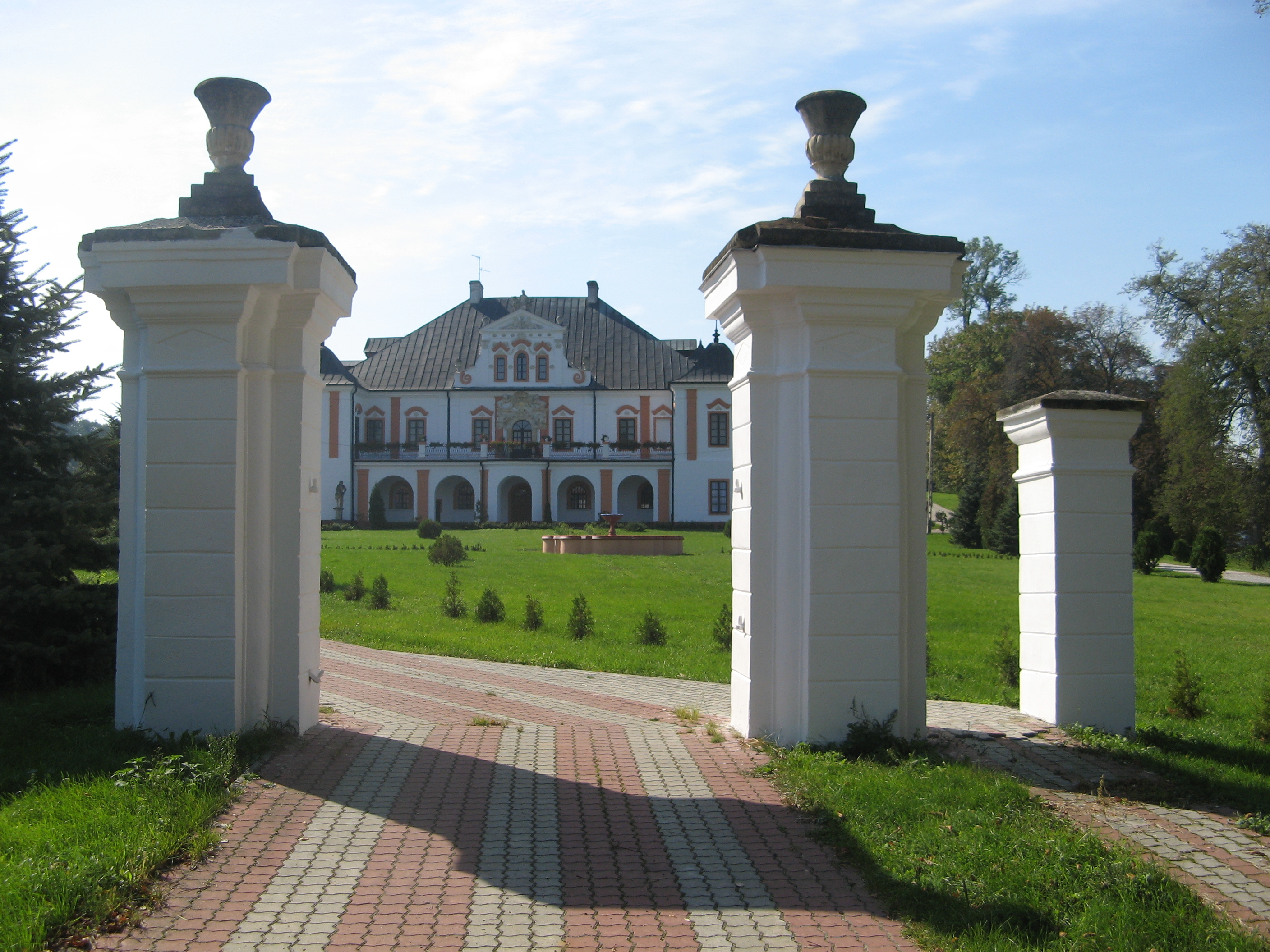 Baroque gates and palace, Czyżów Szlachecki Palace, Poland